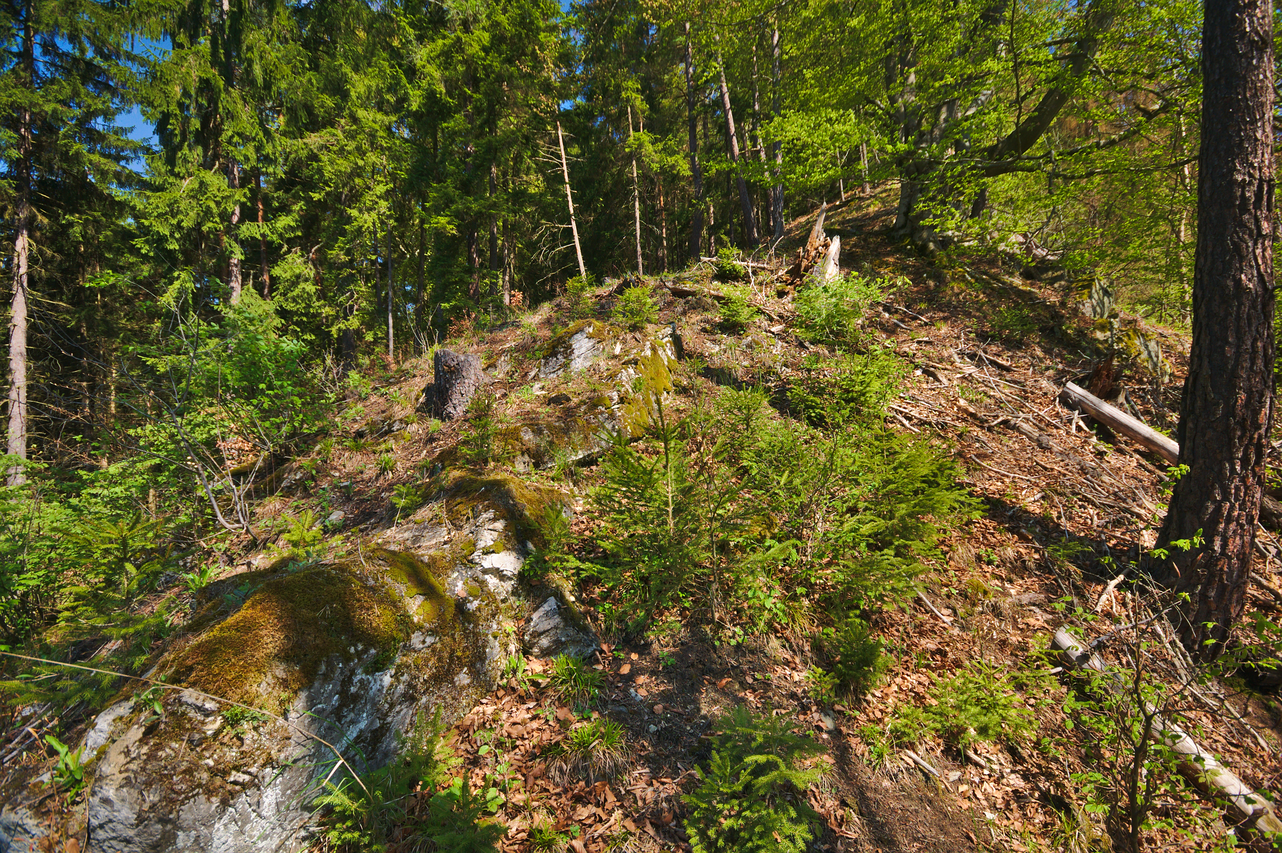 Přírodní památka Dědkovo, okres Žďár nad Sázavou